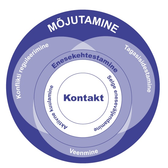 Suhtlusoskuste (baasiliste ja kompleksoskuste) kirjeldus ja seosed skeemina (algus keskel)